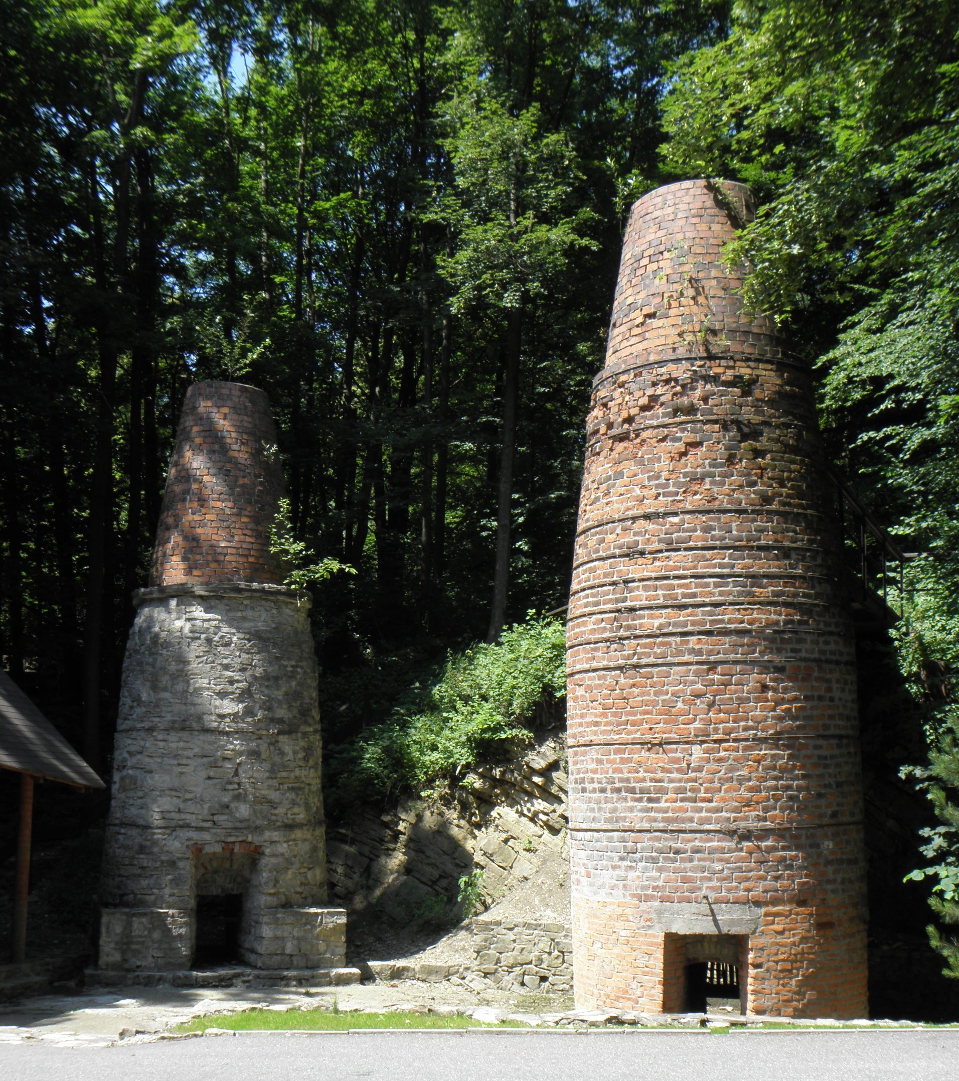 Vápenky ve Vendryni; Vendryně (CZ)